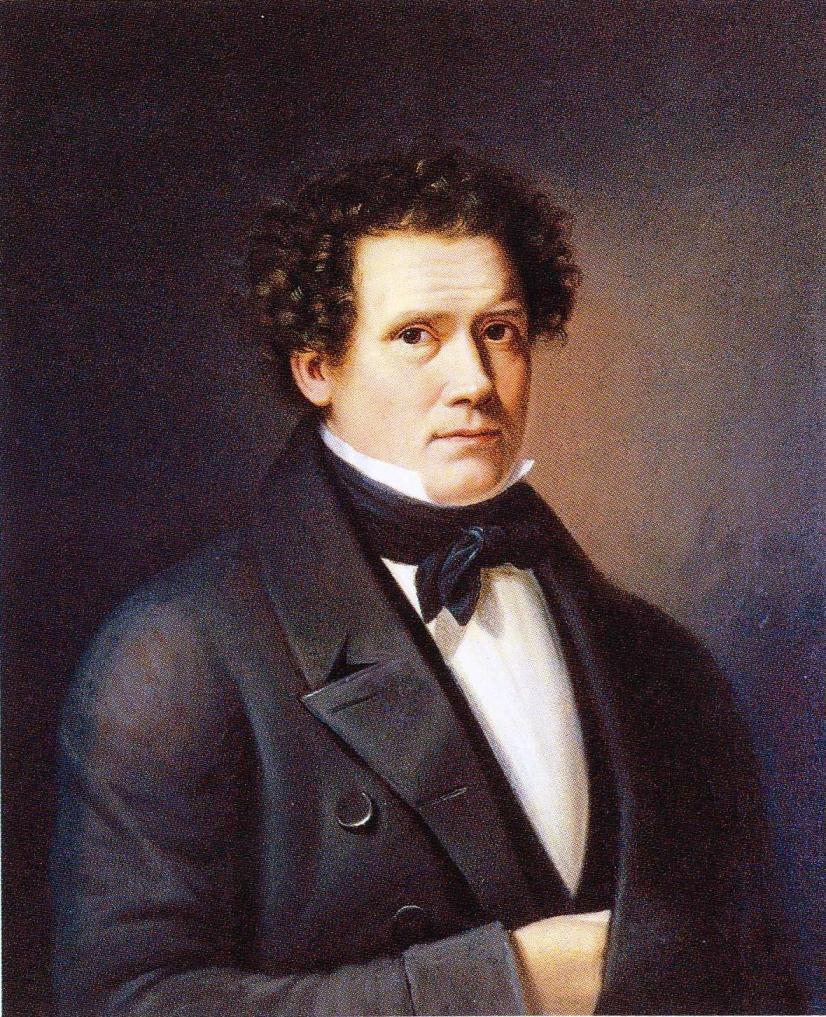 Johan Erik Lindh, omakuva.